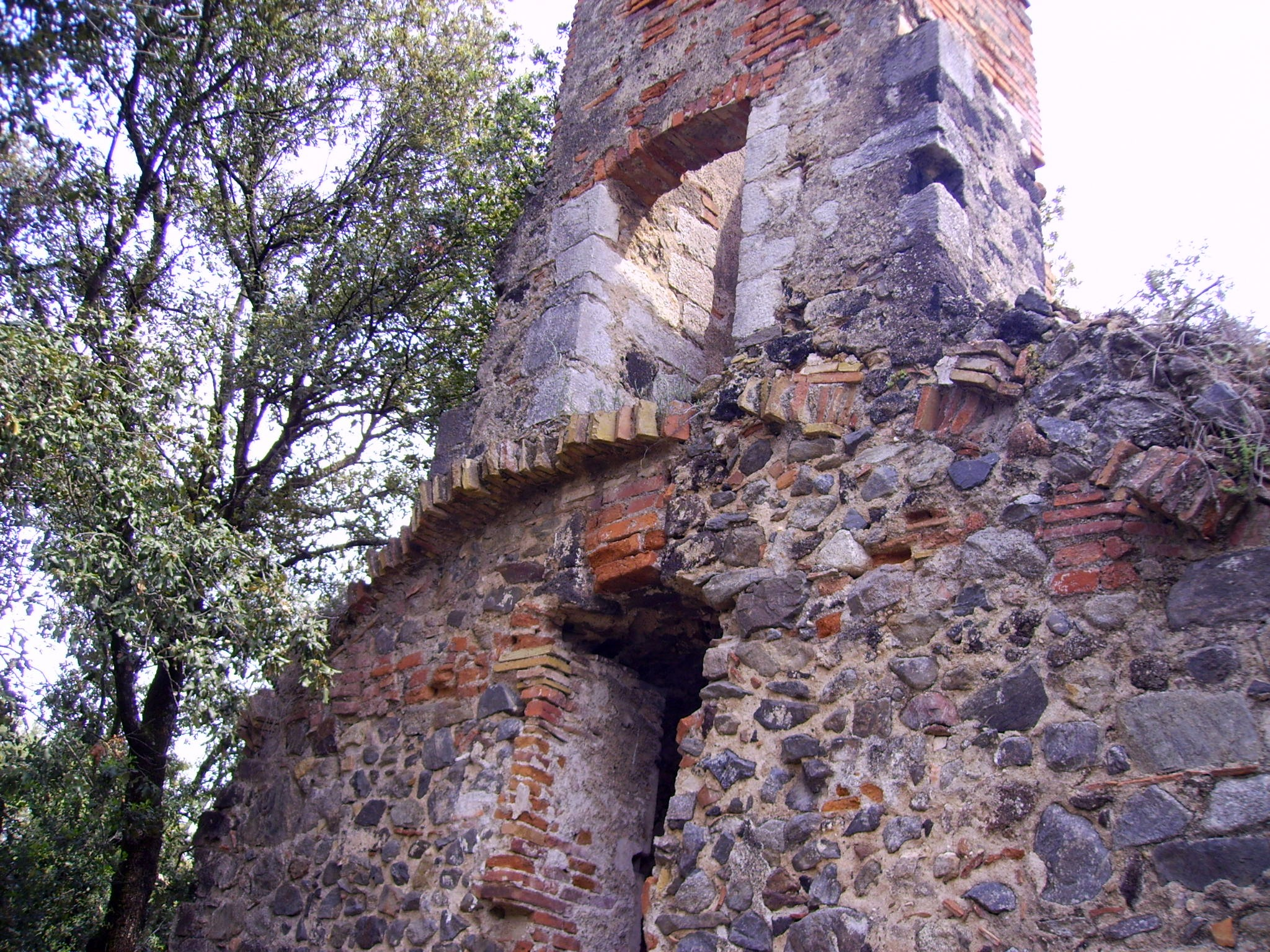 Ermita de Sant Llop (Vilobí d'Onyar)